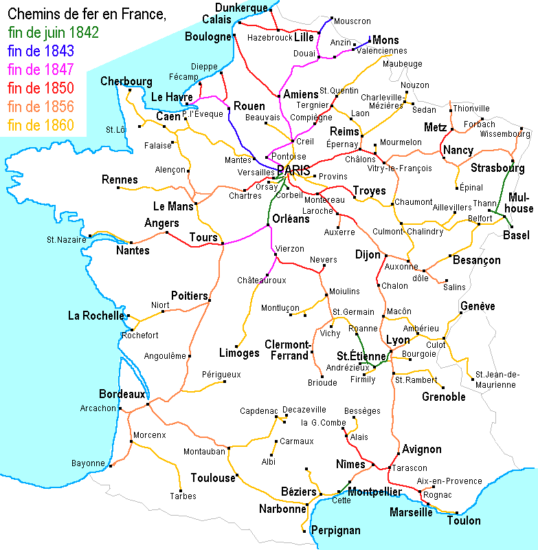 Réseau des chemins de fer de la France jusq'à 1860